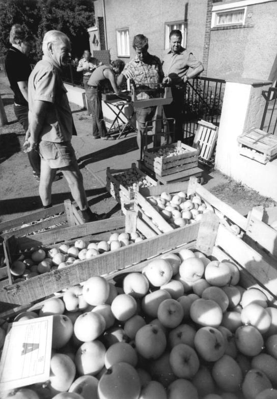 Berlin, Ankauf von Gemüse und Obst ADN-ZB Settnik 1.8.1982 Berlin-Mahrzahn: Gemüse und Obst aus Klein- und Siedlergärten wurden auch an diesem Wochenende in der Aufkaufstelle in der Melanchtonstrasse durch den Verband der Kleingärtner, Siedler und Kleintierzüchter für den Verkauf erfasst. In Klein- und Siedlergärten sowie auf anderen Kleinflächen werden gegenwärtig die Hälfte des Obstes und 29 Prozent des Gemüseaufkommens in der DDR erzeugt.